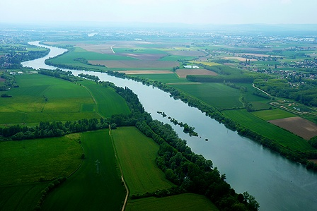 Vue du ciel du village de Bey, en Saône-et-Loire (France). Photo prise depuis un hélicoptère.